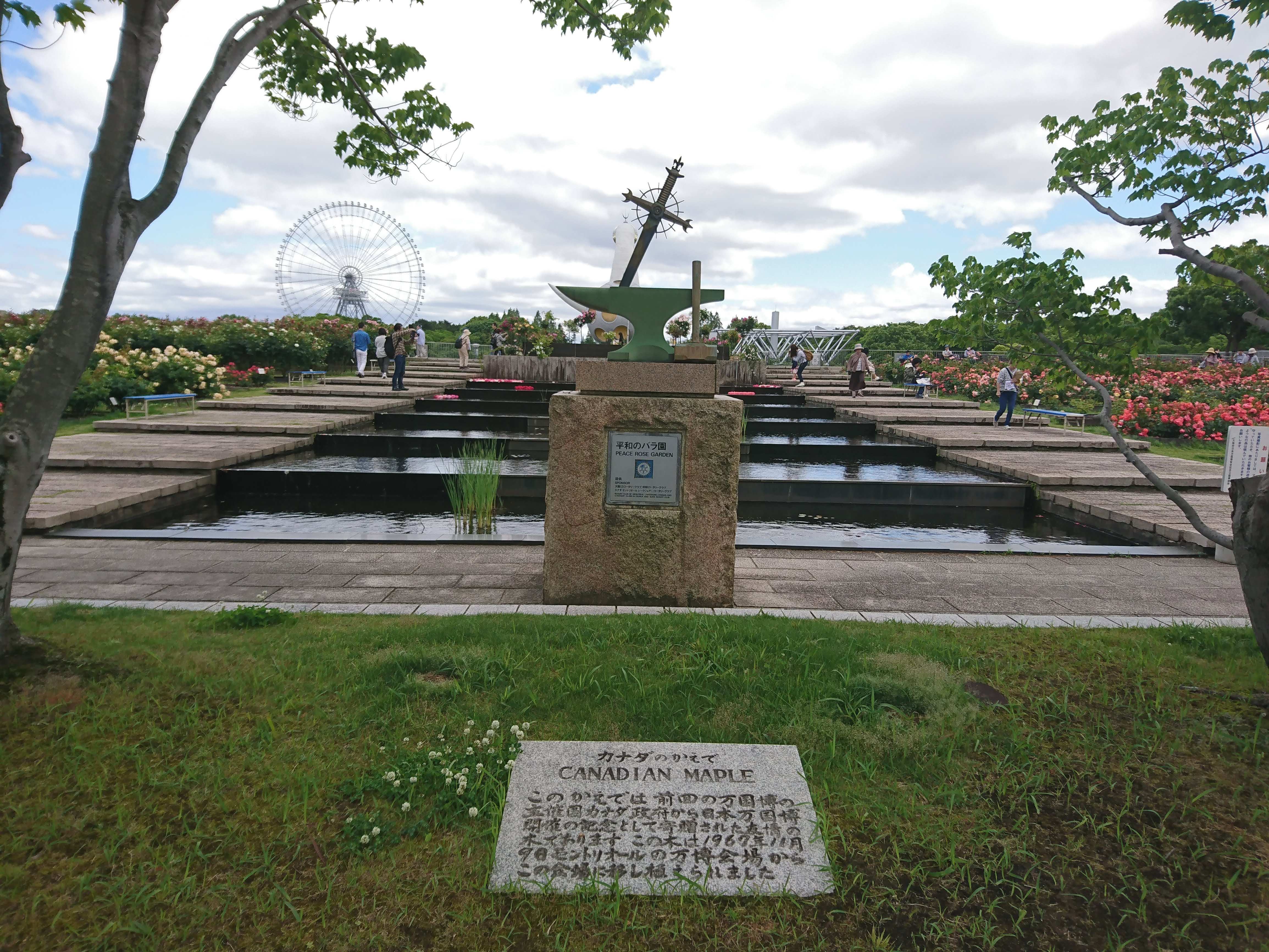 万博公園にあるバラ園